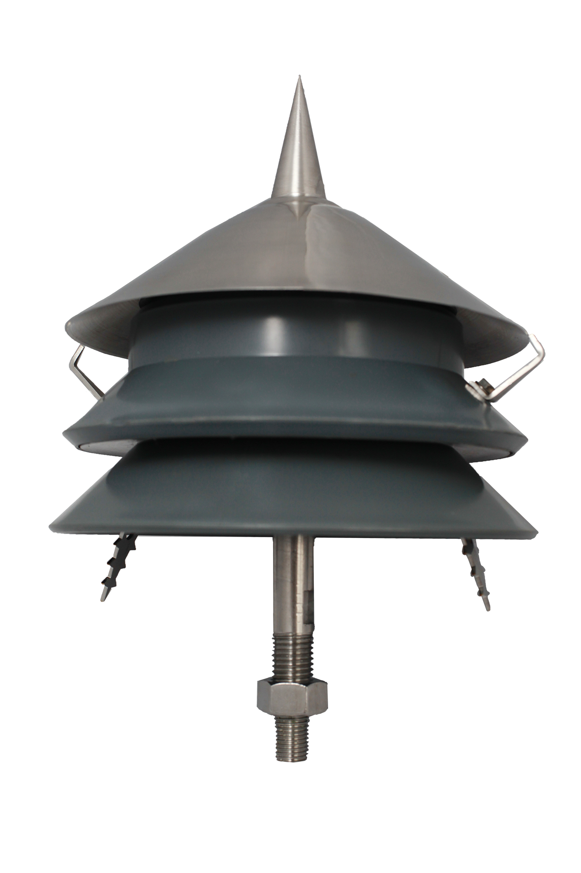 Активный молниеприемник Galmar GALACTIVE 1